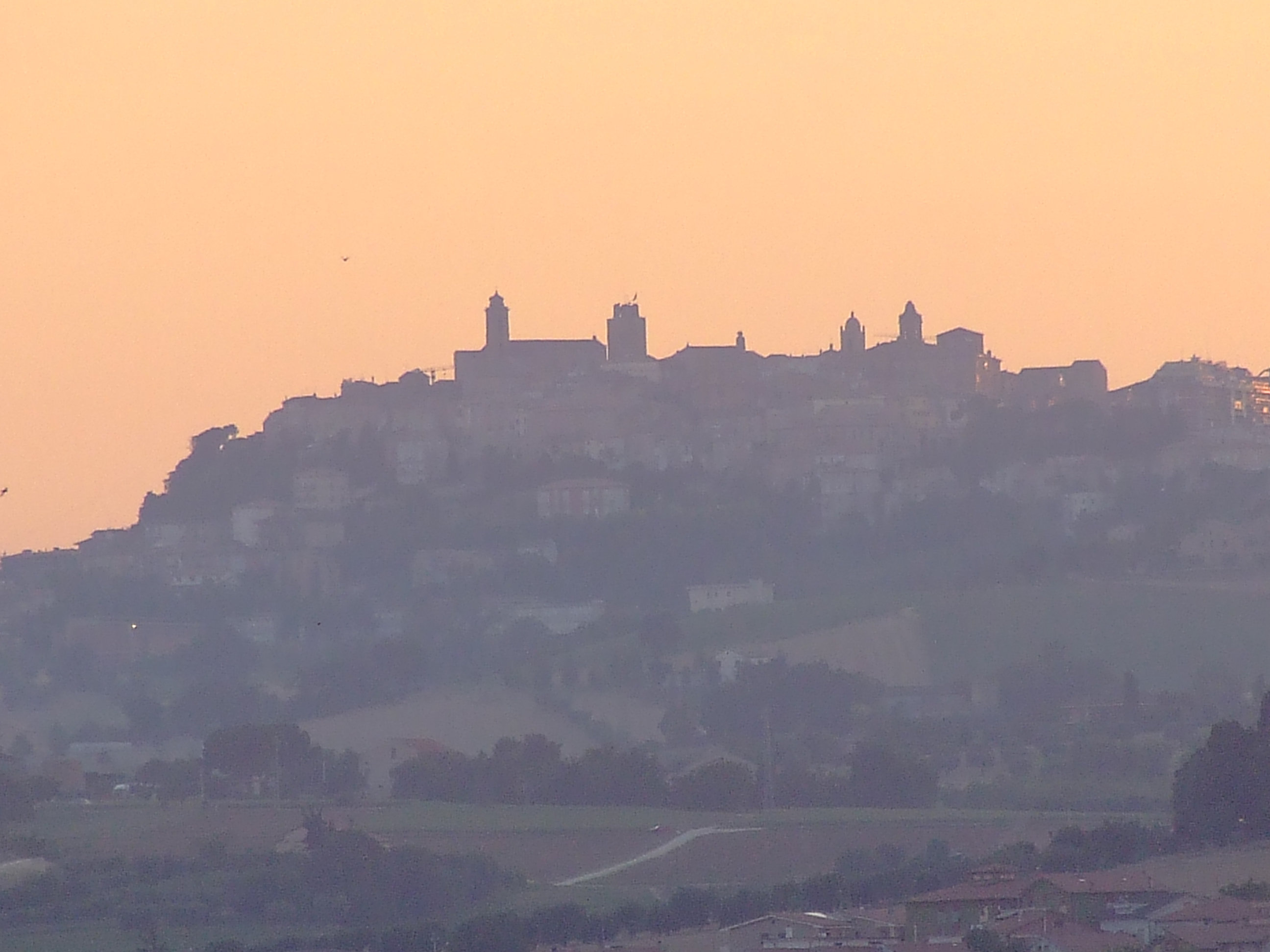 skyline di Sant'Elpidio a Mare